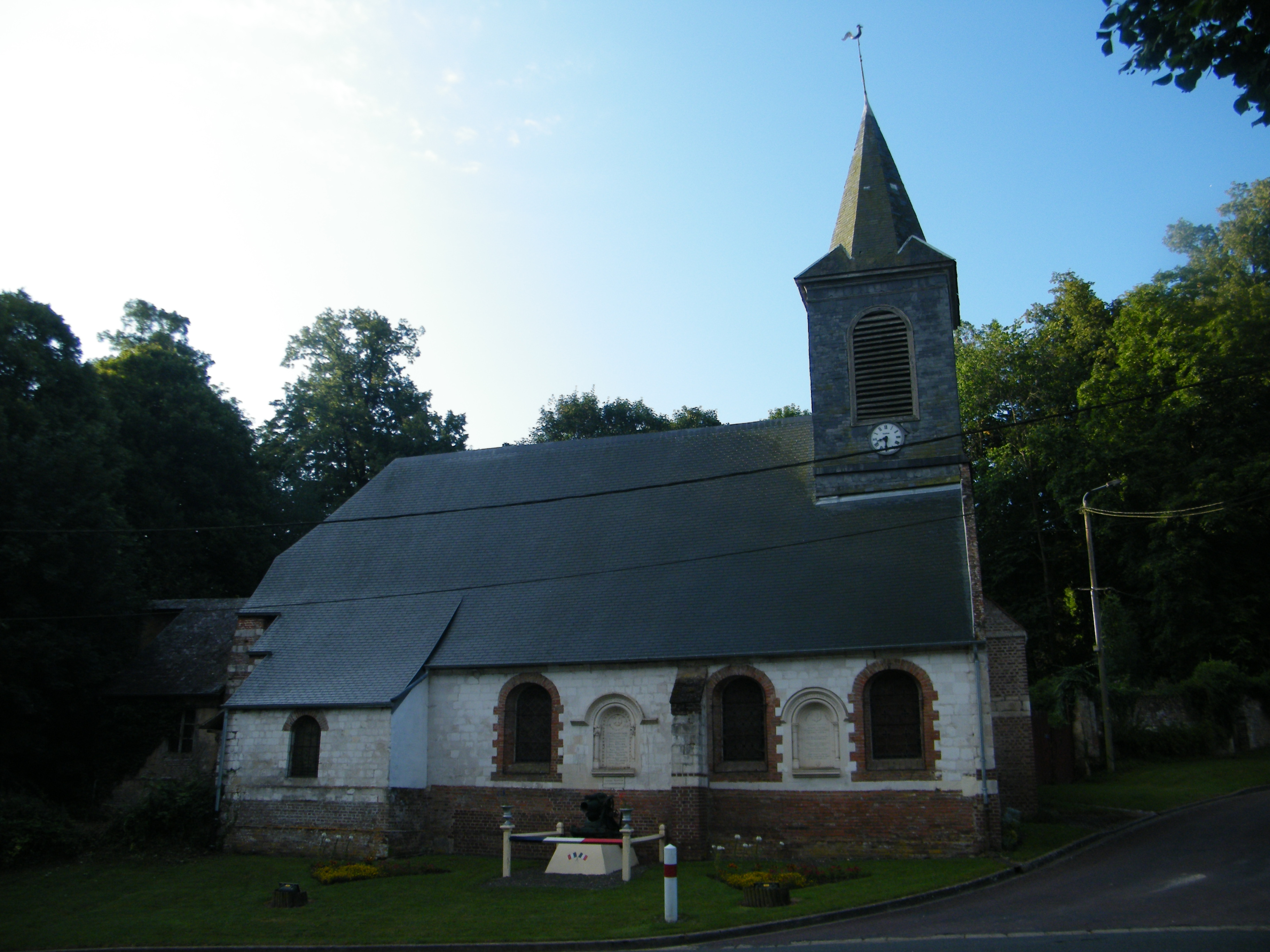 Église Saint-Léonard de Belloy-Saint-Léonard.